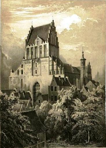 Gdańsk Stare Przedmieście, ul. Żabi Kruk 3 - rzymskokatolicki kościół parafialny p.w. Świętych Apostołów Piotra i Pawła, kon. XIV, XV, po 1962